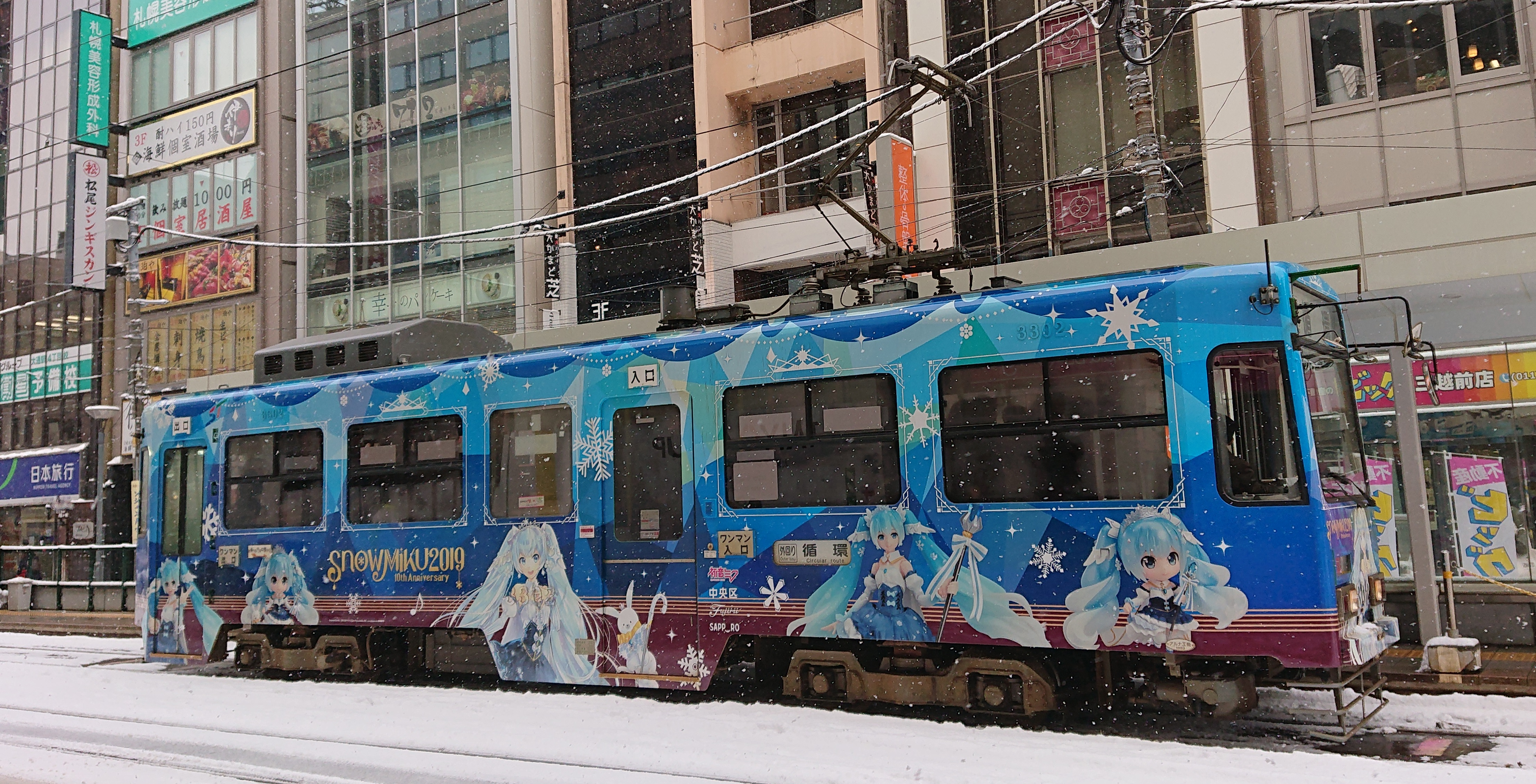 雪ミク電車2019。西4丁目停留所に停車中。